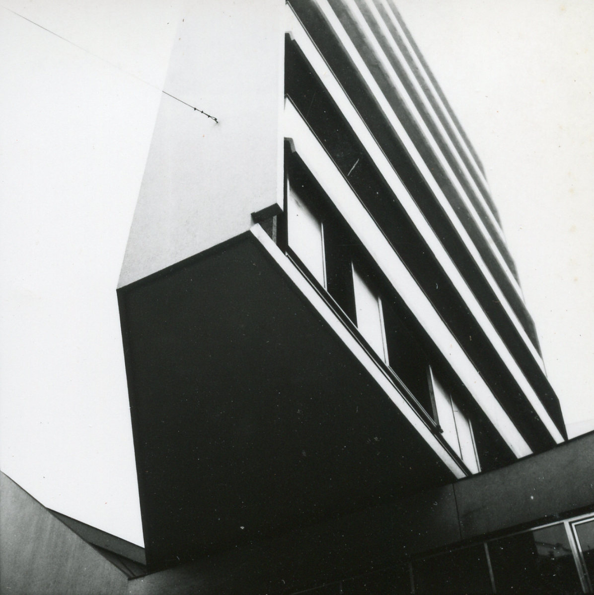 Serie fotografica : Milano, 1970 / Paolo Monti. - Fototipi: 4 : Positivo b/n, gelatina bromuro d'argento/ carta, provino a contatto da pellicola 6x6. - ((La suddetta serie è contenuta nella scatola identificata con la numerazione 142; sul coperchio iscrizione manoscritta a pennarello: "Contatti 7a"